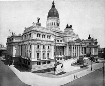 Congreso Nacional de Argentina construido por Víctor Meano. Imágen del Congreso de la Nación Argentina hacia 1906, año de su inauguración. Extraída del sitio oficial de la Cámara de Diputados (que no indica copyright)